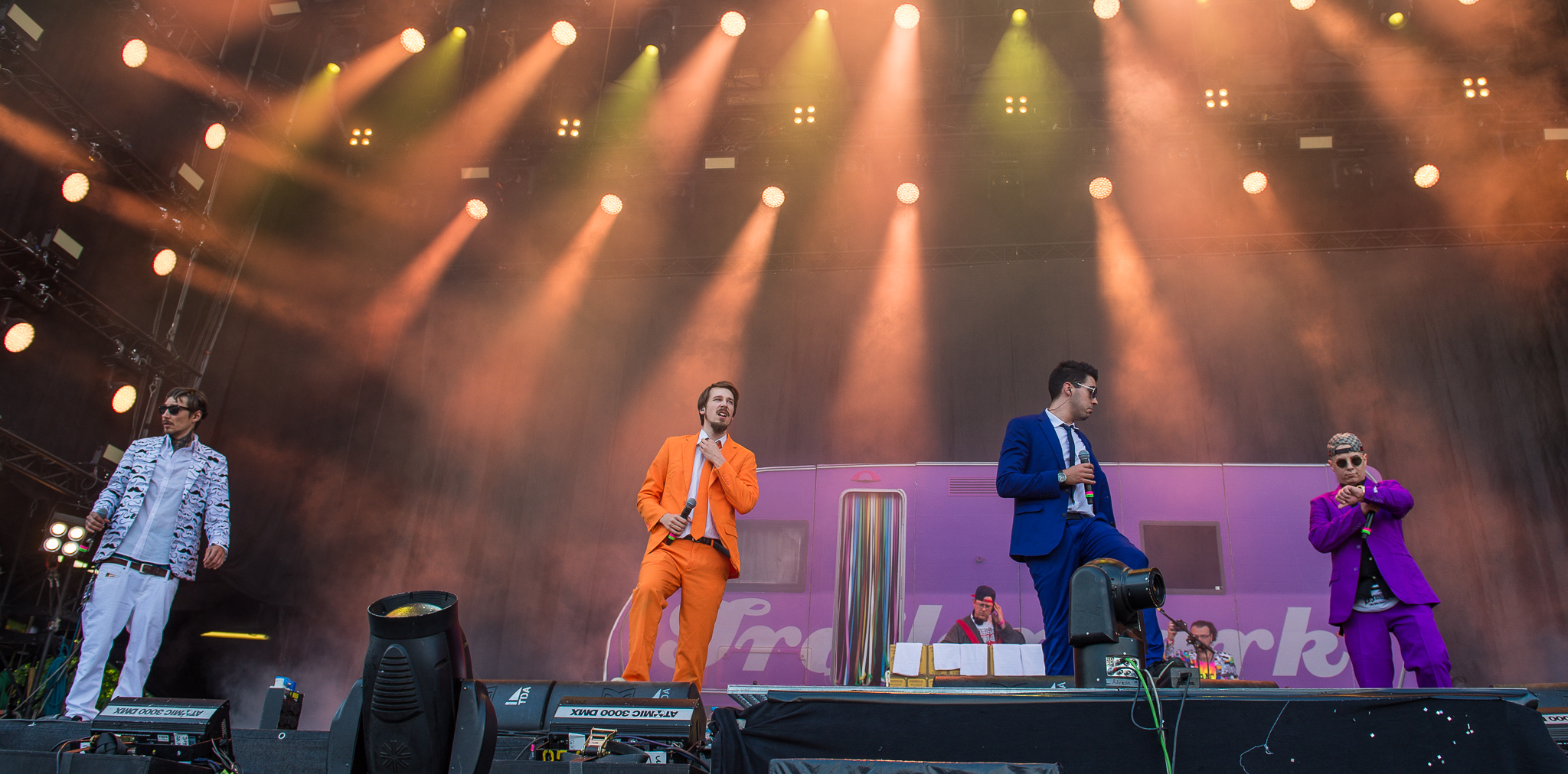 ARGO-Konzerte,Alligatoah,Basti,Beck's Park Stage,Festival,Konzert,Livekonzert,Livemusik,Lukas Strobel,Musik,RiP,Rock im Park 2015,Sebastian Krug,Steven Matyssek,Sudden,Tim Weitkamp,Timi Hendrix,Trailerpark